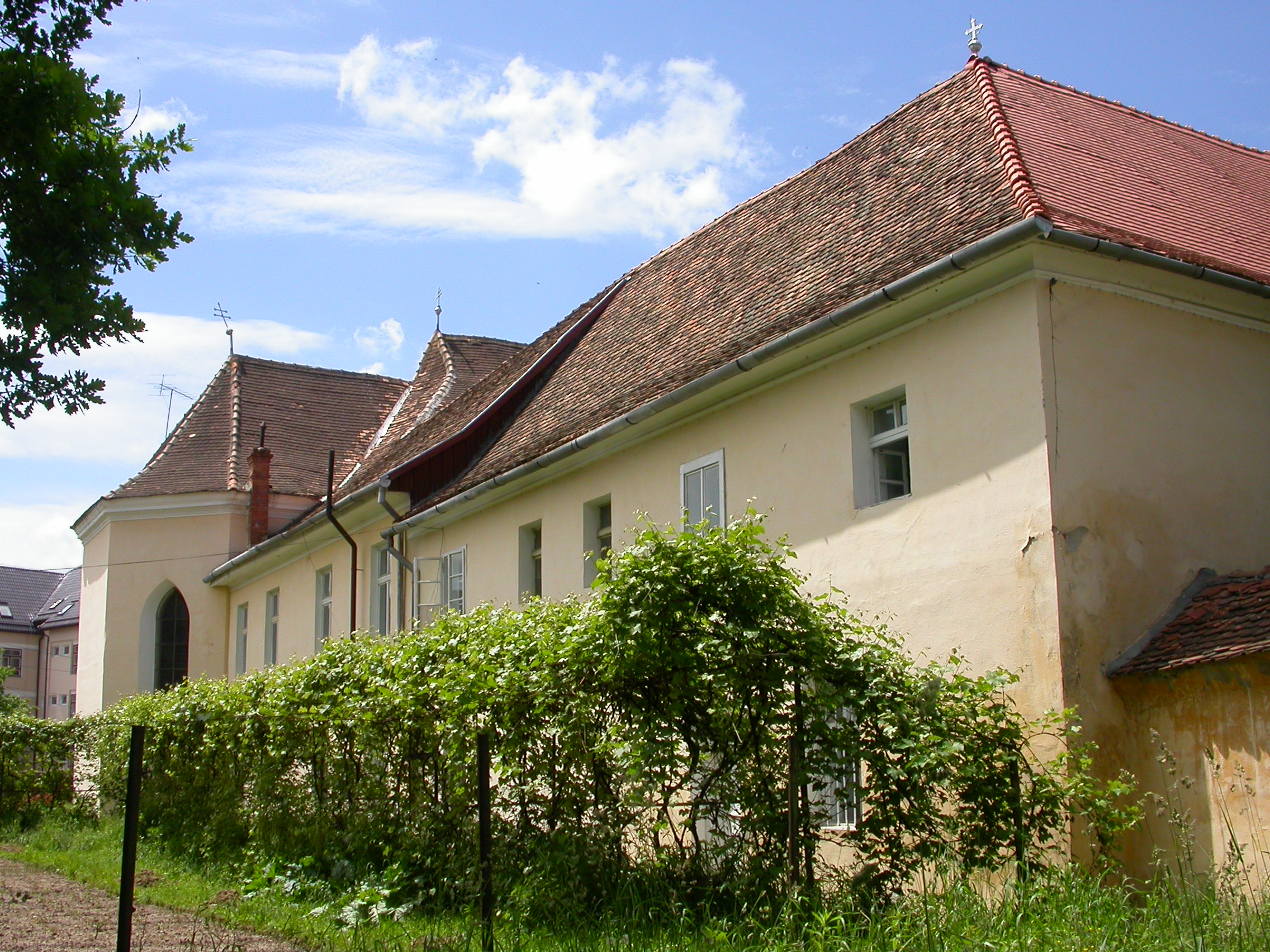 Mănăstirea franciscană, 1721 02